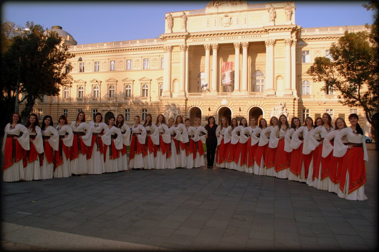 Народний дівочий хор "Ліра" на площі перед ЛНУ